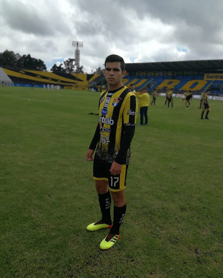 José Sandoval con Aurora Fútbol Club.